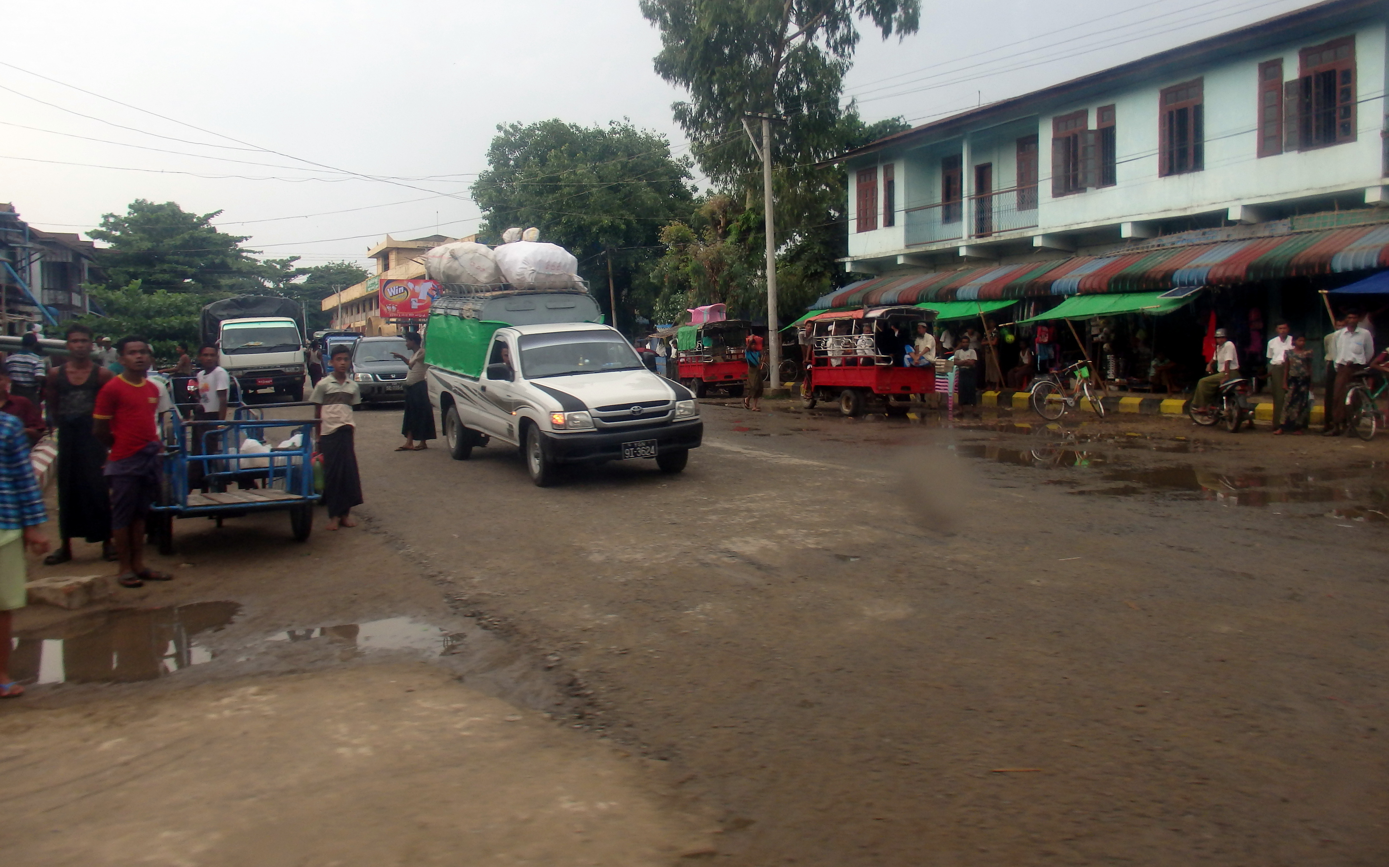 Maungdaw, Myanmar (Burma)